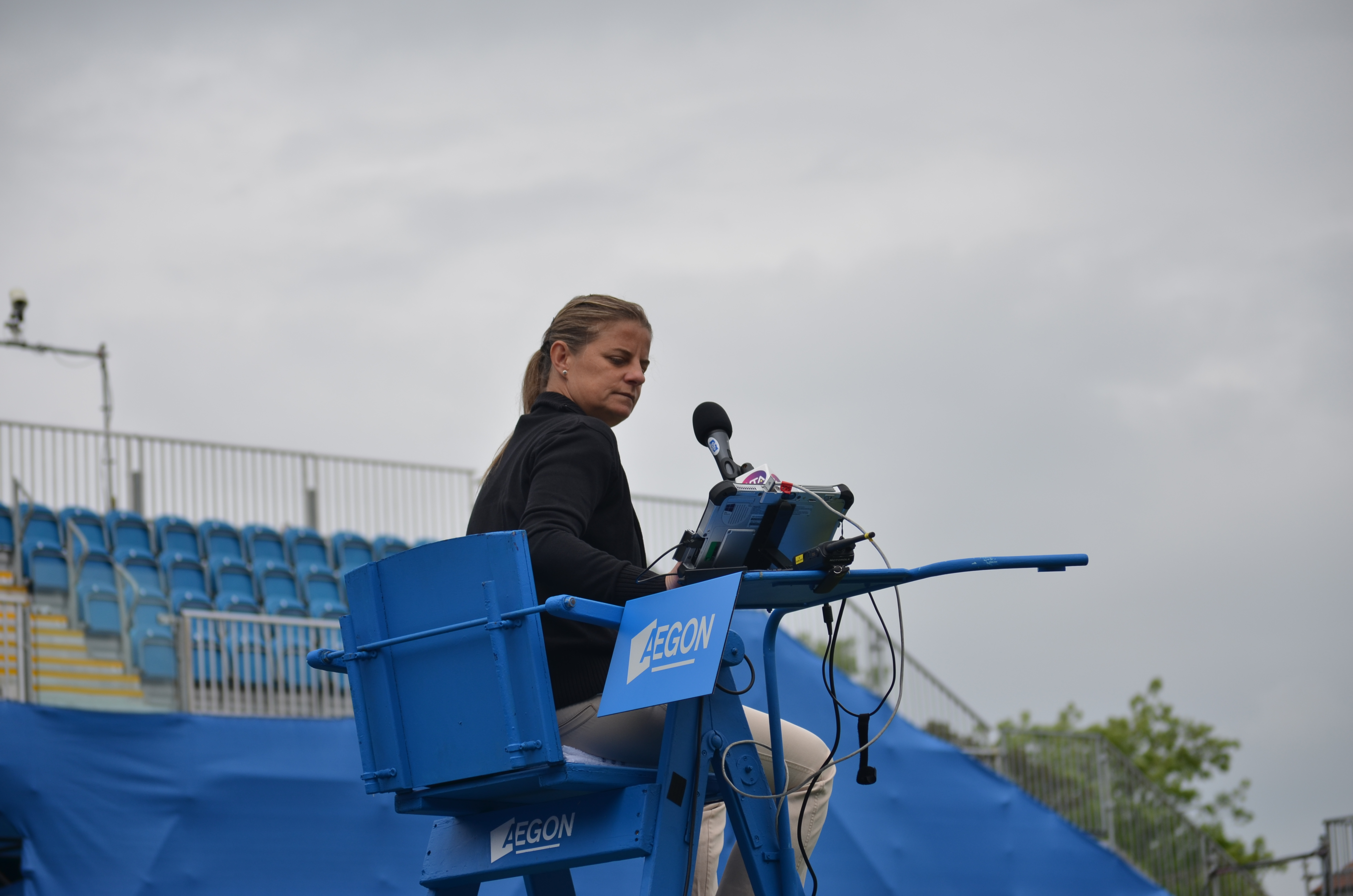 Mariana Alves